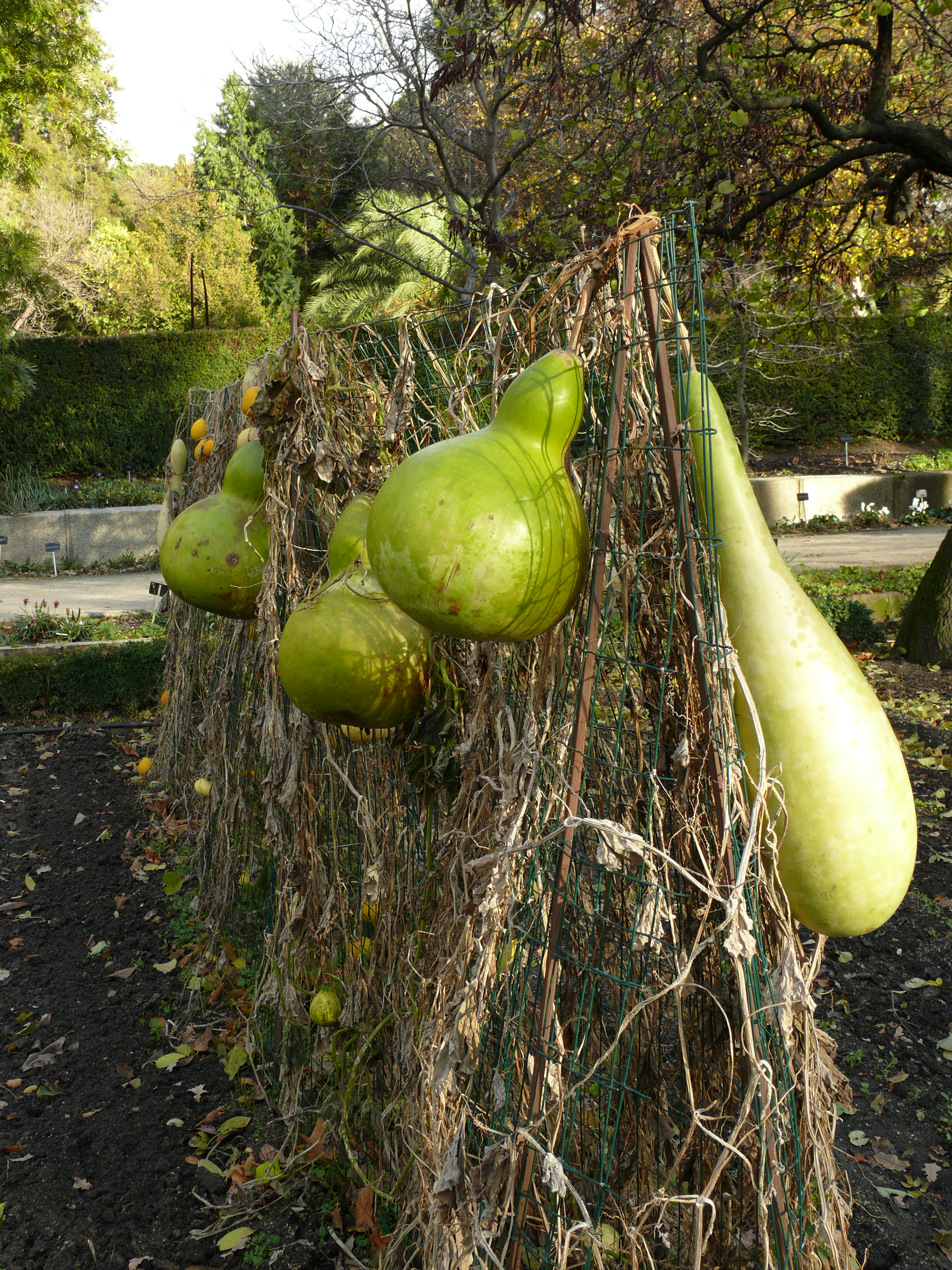 Calabaza del peregrino, Lagenaria siceraria. Foto tomada en el Real Jardín Botánico de Madrid por © Manuel González Olaechea y Franco